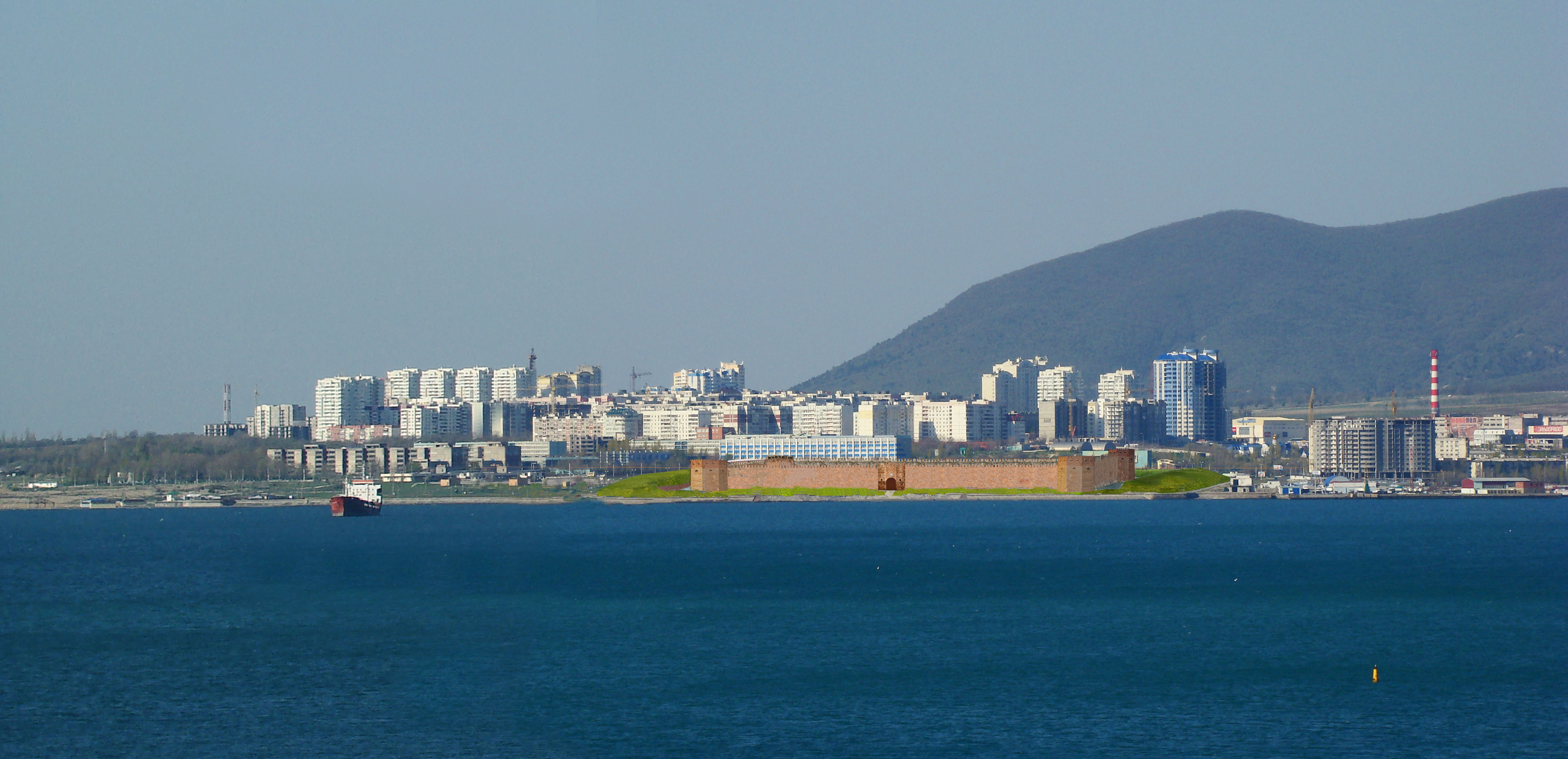 Турецкая крепость Суджук-Кале на фоне современного Новороссийска